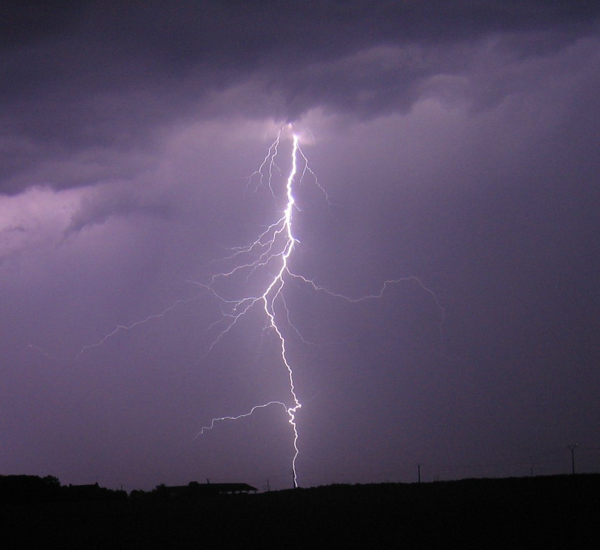 Coup de foudre (éclair nuage-sol), pris par Nico36 en juillet 2006 près d'Issoudun dans l'Indre (36)